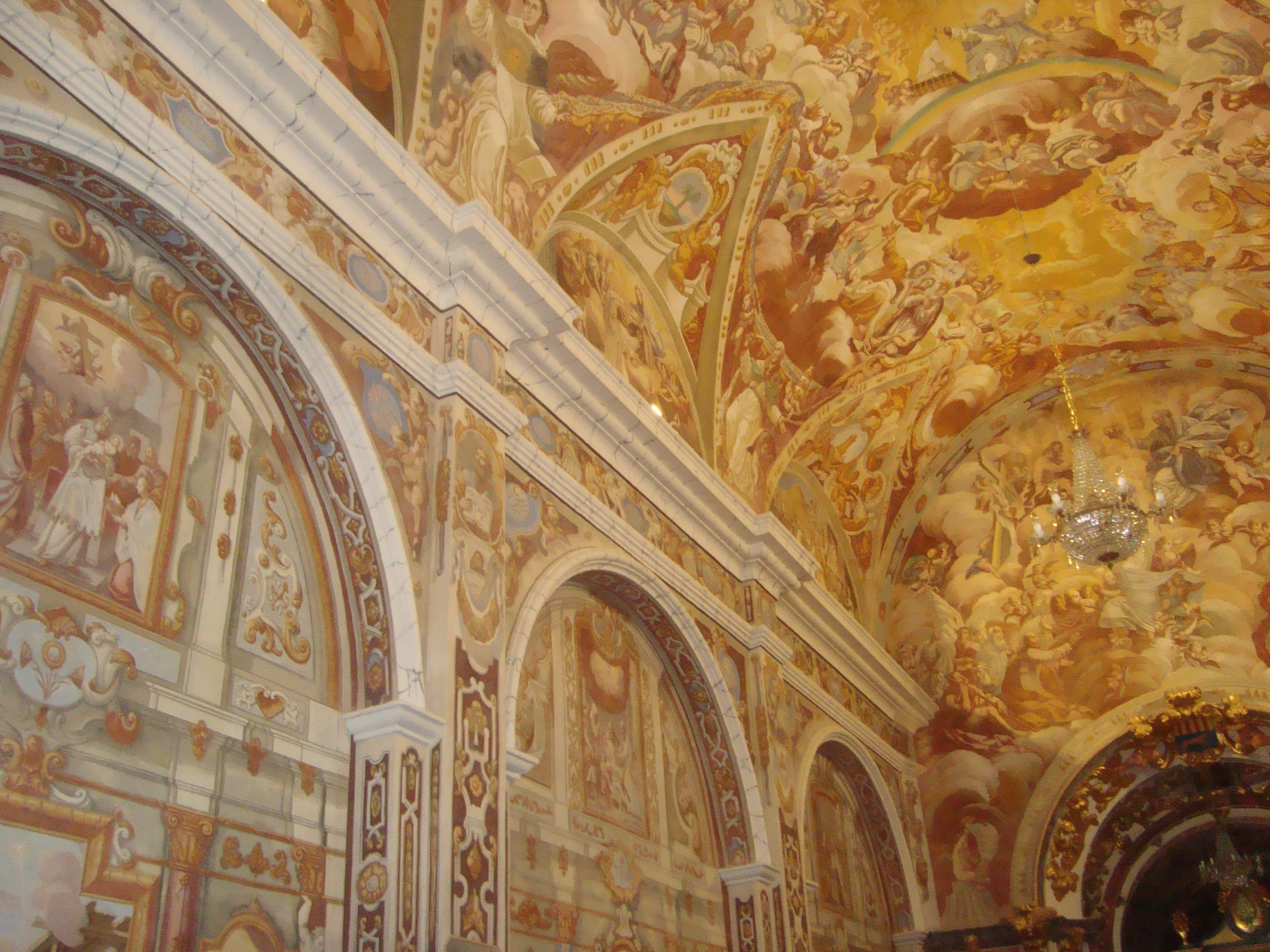 Ermita de la Madre de Dios del Avellá 02.042-002.